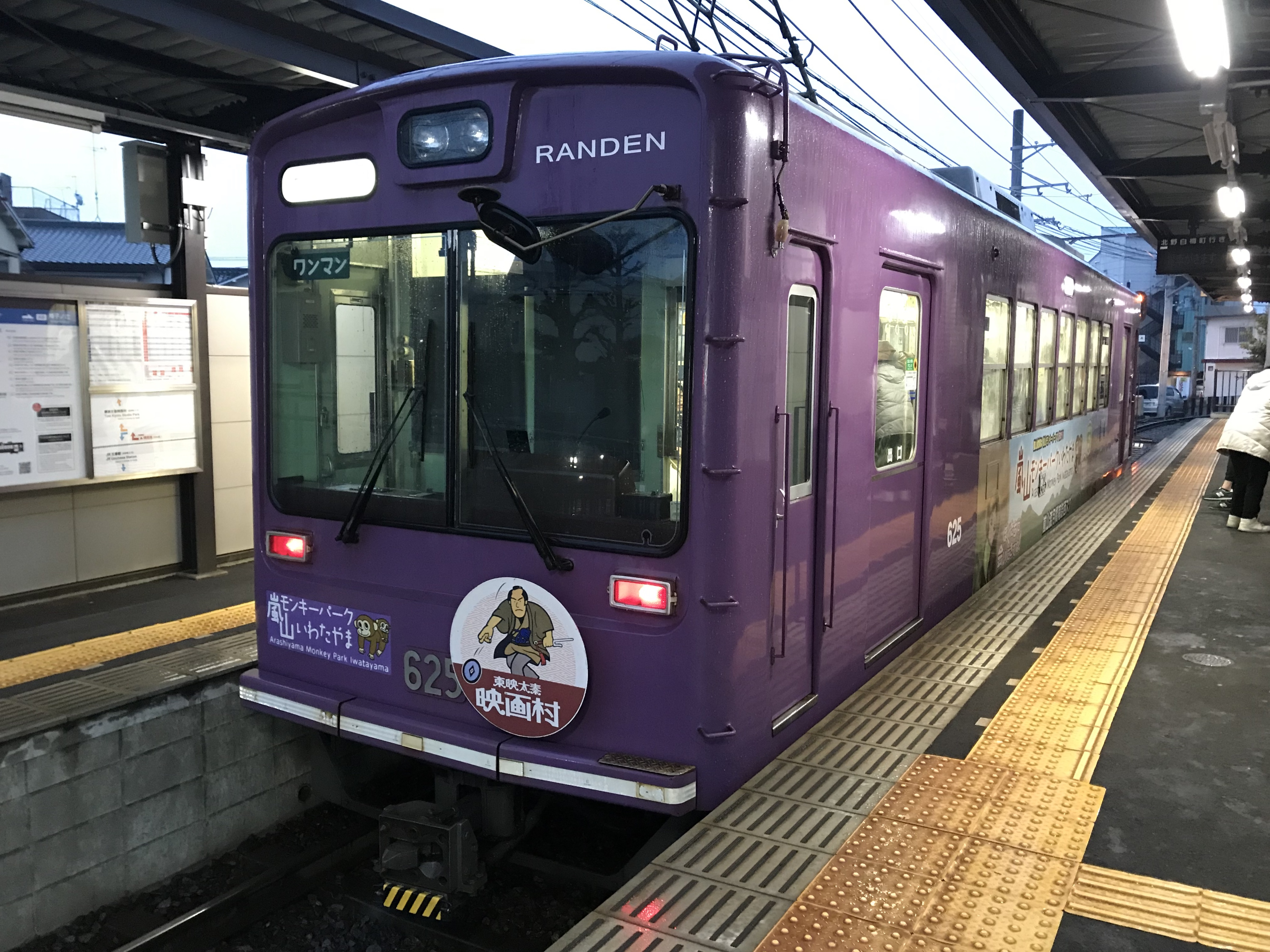 撮影所前駅に停車中の帷子ノ辻行き北野線車両